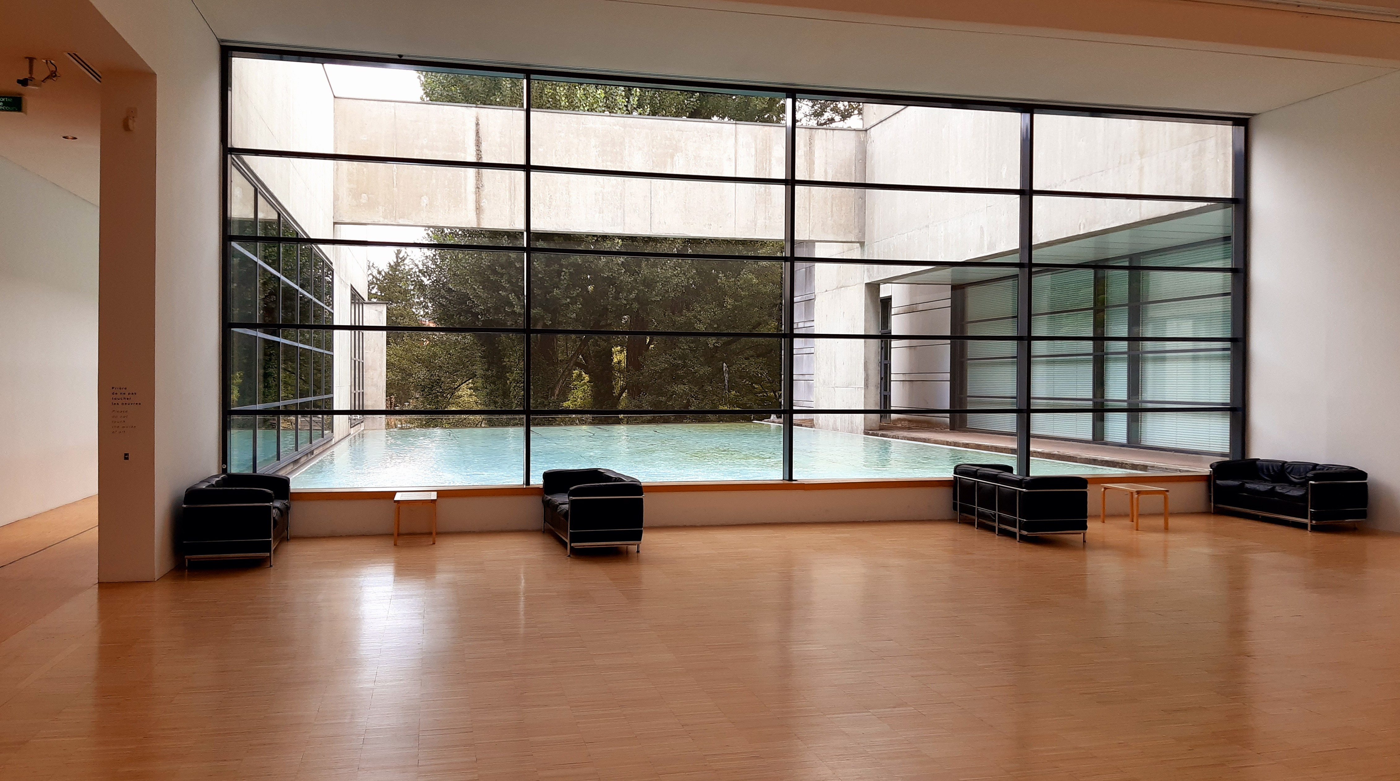 Bassin d'eau du musée de Grenoble.